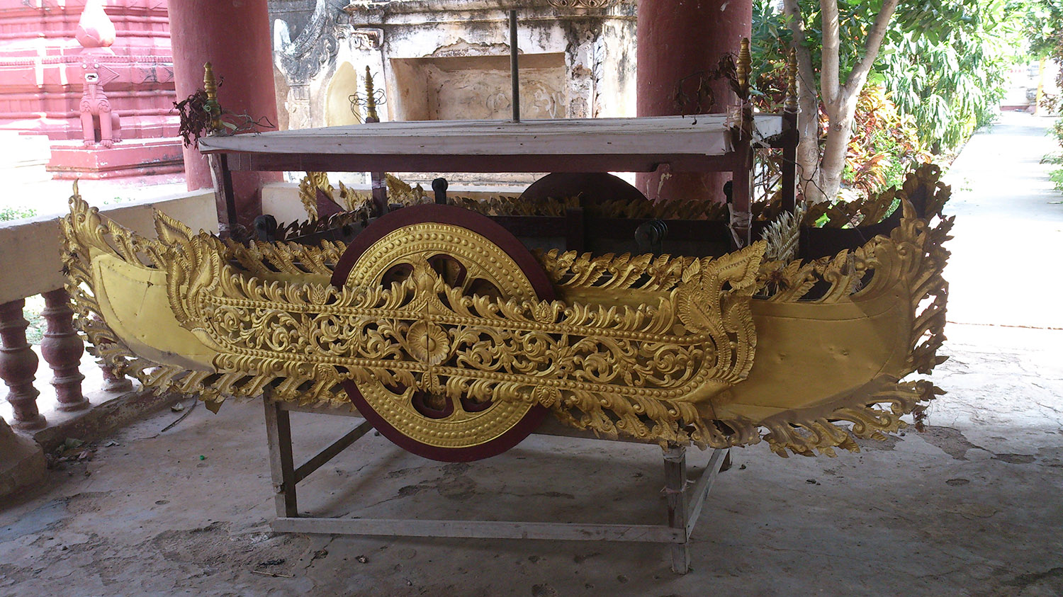 မြန်မာဘာသာ: ဘုရားထီးတင်သည့် နတ်ရထားယာဉ်ပျံ